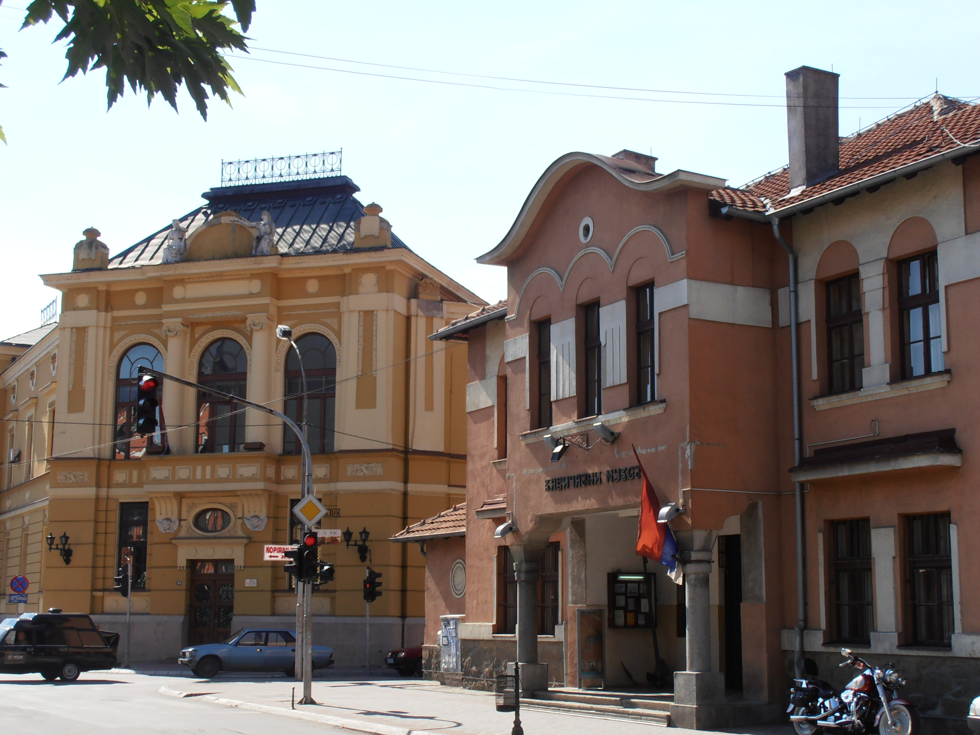 Zgrade Osnovnog suda i Zavicajnog muzeja y Jagodini